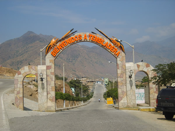 Esta fotografía es del Portal de Bienvenida a la ciudad de Tembladera de Oeste a Este